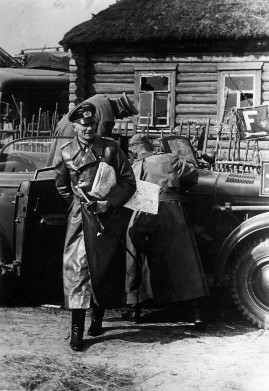 Russland, Fedor von Bock An der Sowjetfront: Generalfeldmarschall von Bock, Oberbefehlshaber der Heeresgruppe Mitte, begibt sich während der Angriffsoperationen zu einer Infanteriedivision. Der Oberbefehlshaber ist vor dem Divisionsgefechtsstand eingetroffen und begibt sich zur Lagebesprechung. (Nikolskoje) Abgebildete Personen: Bock, Fedor von: Generalfeldmarschall, Ritterkreuz (RK), Heer, Deutschland (PND 119294796)